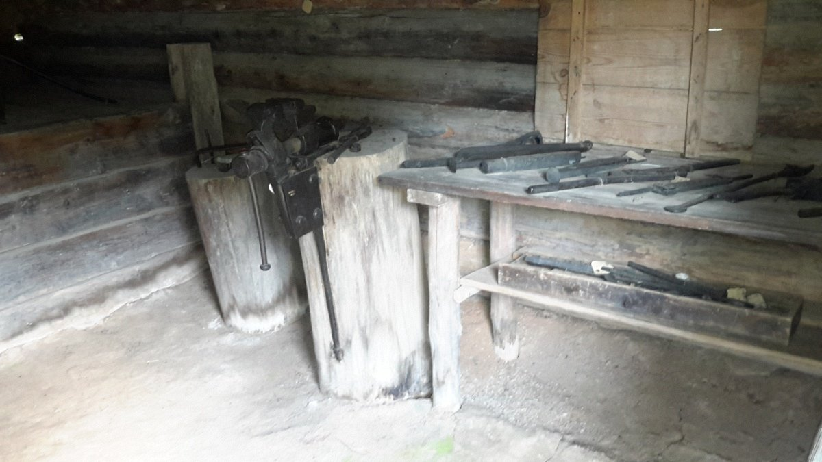 Строчыца. БДМНАБ. Кузня з в. Клочкава